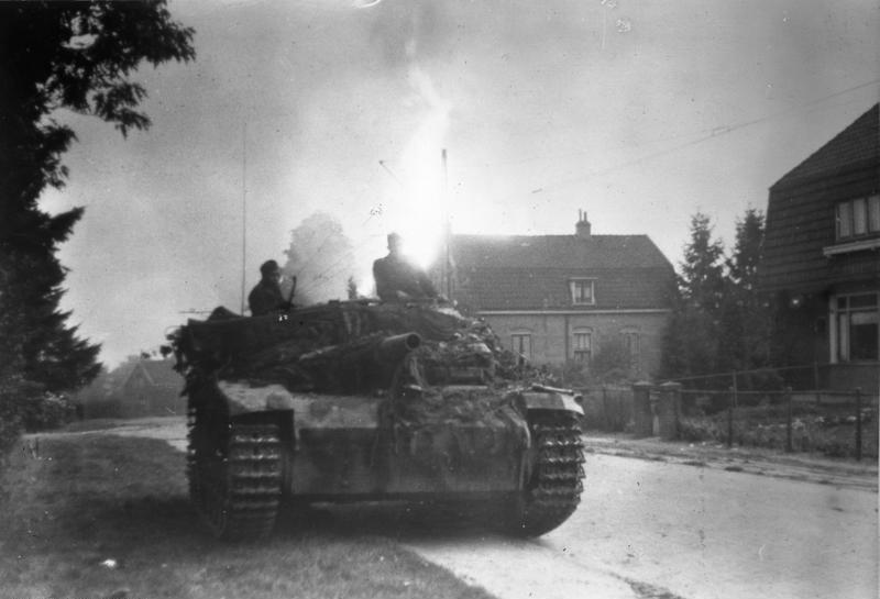 Niederlande, Arnheim.- Schlacht um Arnheim.- Sturmhaubitze 42 in einer Straße Scherl Bilderdienst Von den Kämpfen um Arnheim Der Vernichtung der 1. englischen Luftlandedivision im Raum Arnheim gingen heftige Kämpfe in den Strassen dieser niederländischen Stadt voraus. Deutsche Sturmgeschütze griffen in die Kämpfe ein und brachen den an vielen Stellen sehr erbitterten Widerstand der Briten. Pk-Aufnahme, Kriegsberichter Kutzner (Sch), 30.9.44 [Herausgabedatum] ADN-Bildarchiv, II. Weltkrieg 1939-45, Schlacht um Arnheim (Holland) vom 17.-27.9.1944 Die am 17.9.1944 begonnene alliierte Luftlandeoperation bei Arnheim sollte die Übergänge Rhein, Maas und Waal sichern. Nach großen Verlusten wurden die gelandeten Truppen Ende September zurückgezogen. Deutsche Sturmgeschütze werden in Arnheim eingesetzt. Aufnahme: Kutzner